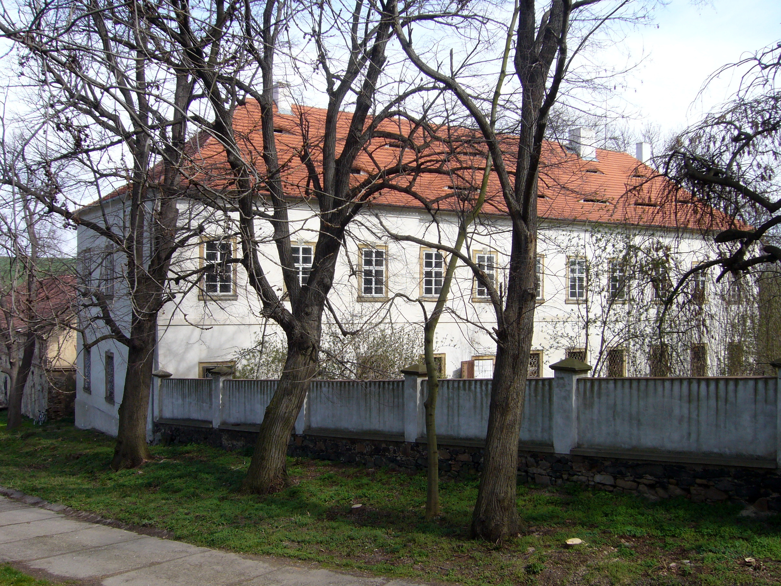 Libědice - zámek